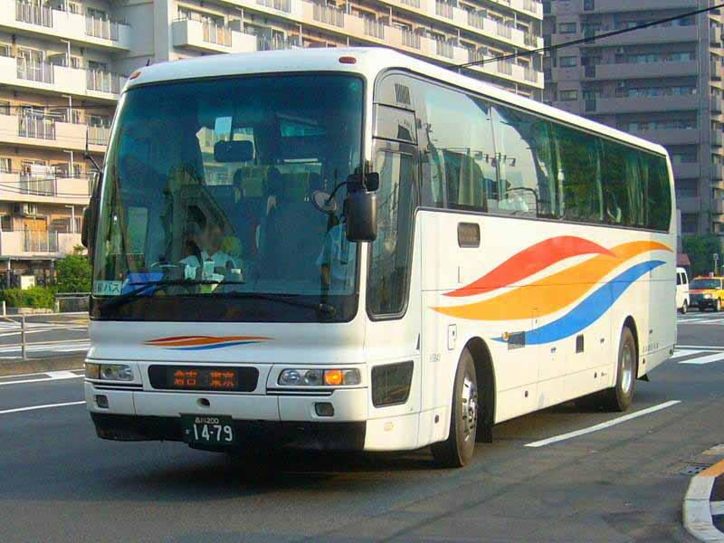 登録番号：品川200か14-79 京浜急行バス羽田営業所所属 car no.5644 高速用車両（各系統で共通運用） 三菱ふそう・エアロクィーン PJ-MS86JP